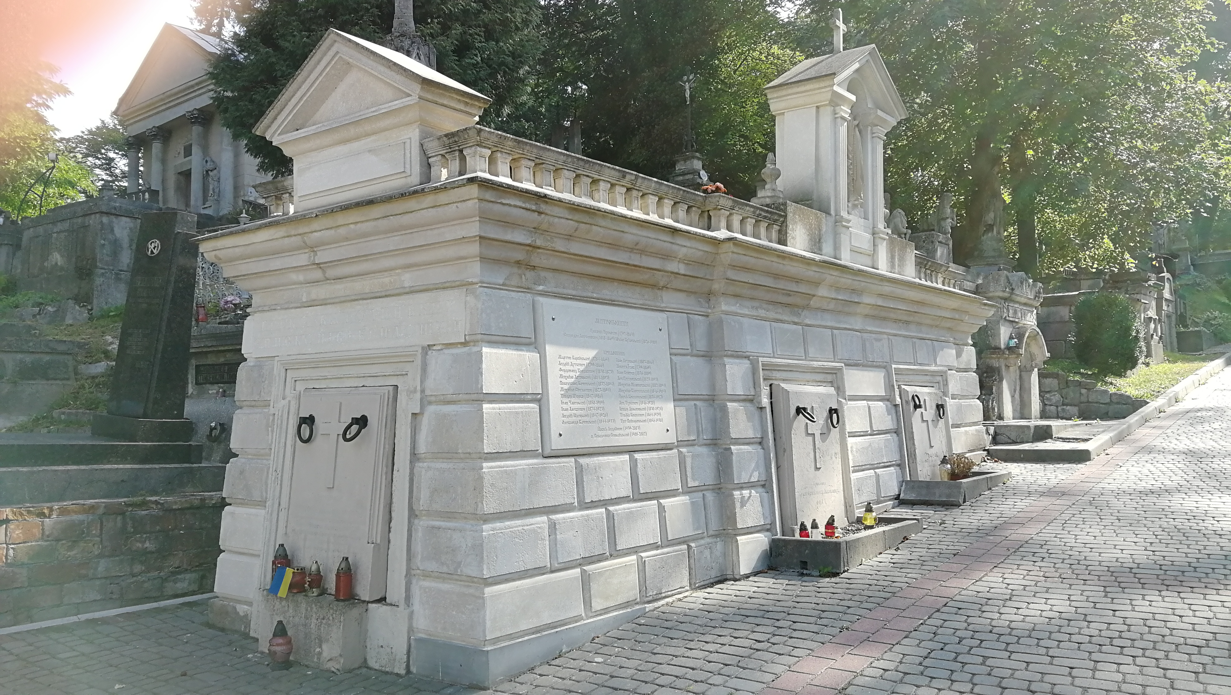 Hrobka haličských metropolitů a kanovníků na Lyčakovském hřbitově ve Lvově (po instalaci desky se jmény zde pohřbených)